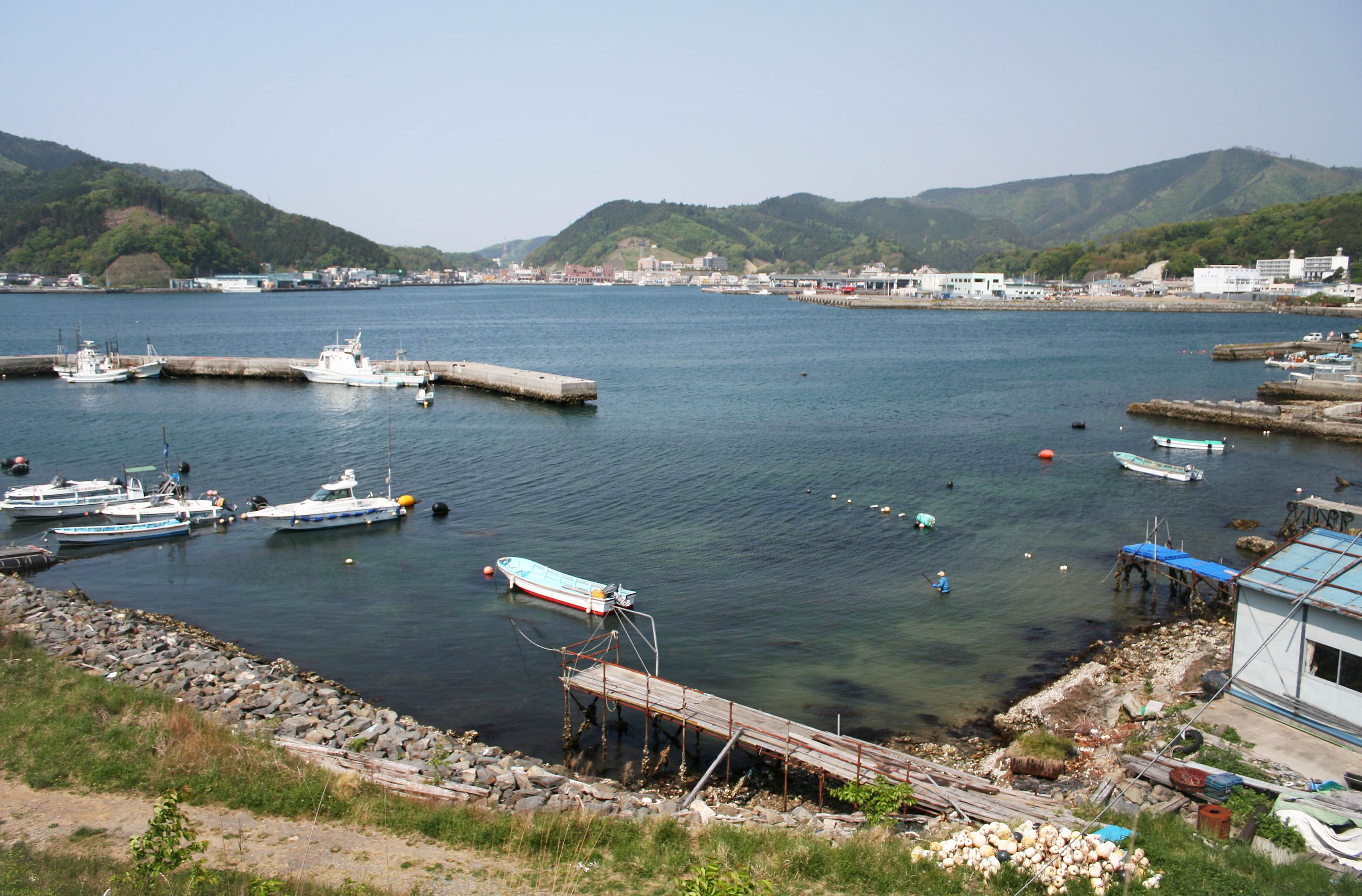 女川港Onagawa-kou